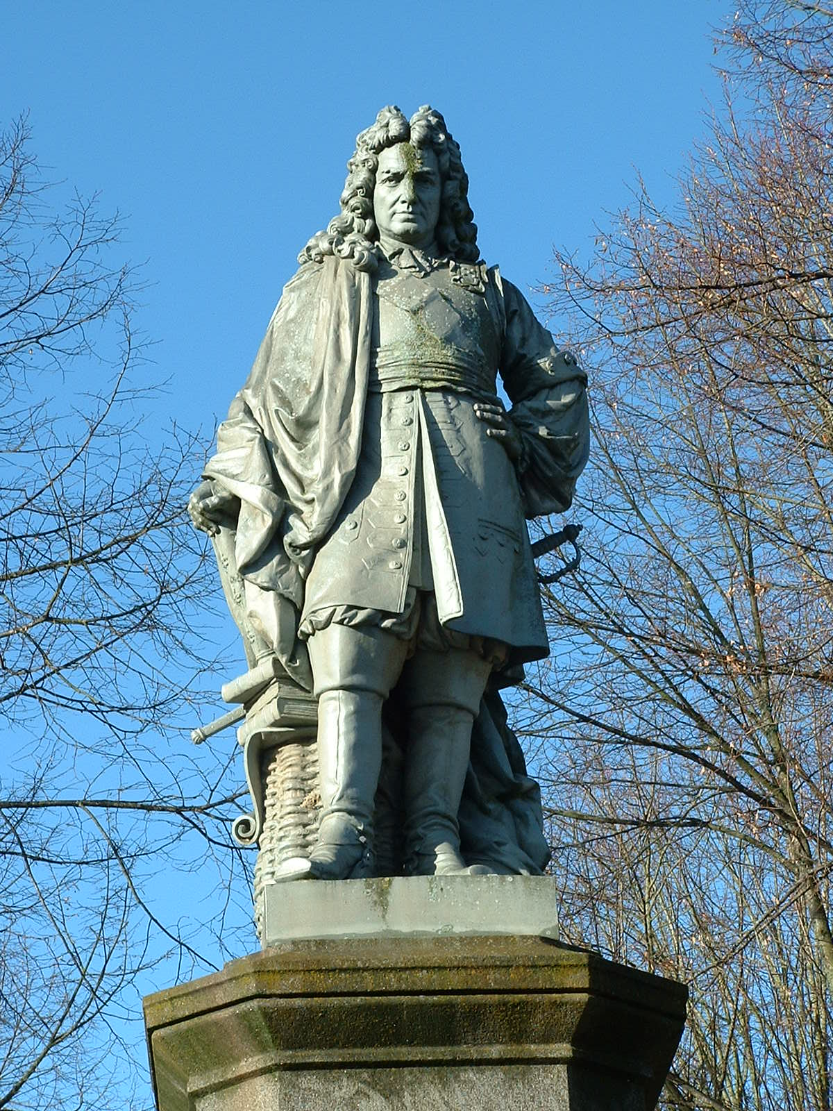 Statue en bronze de Auguste Bartholdi, représentant le maréchal de France Vauban. Elle est construite entre 1864 et 1873 (Avallon, Yonne, France).